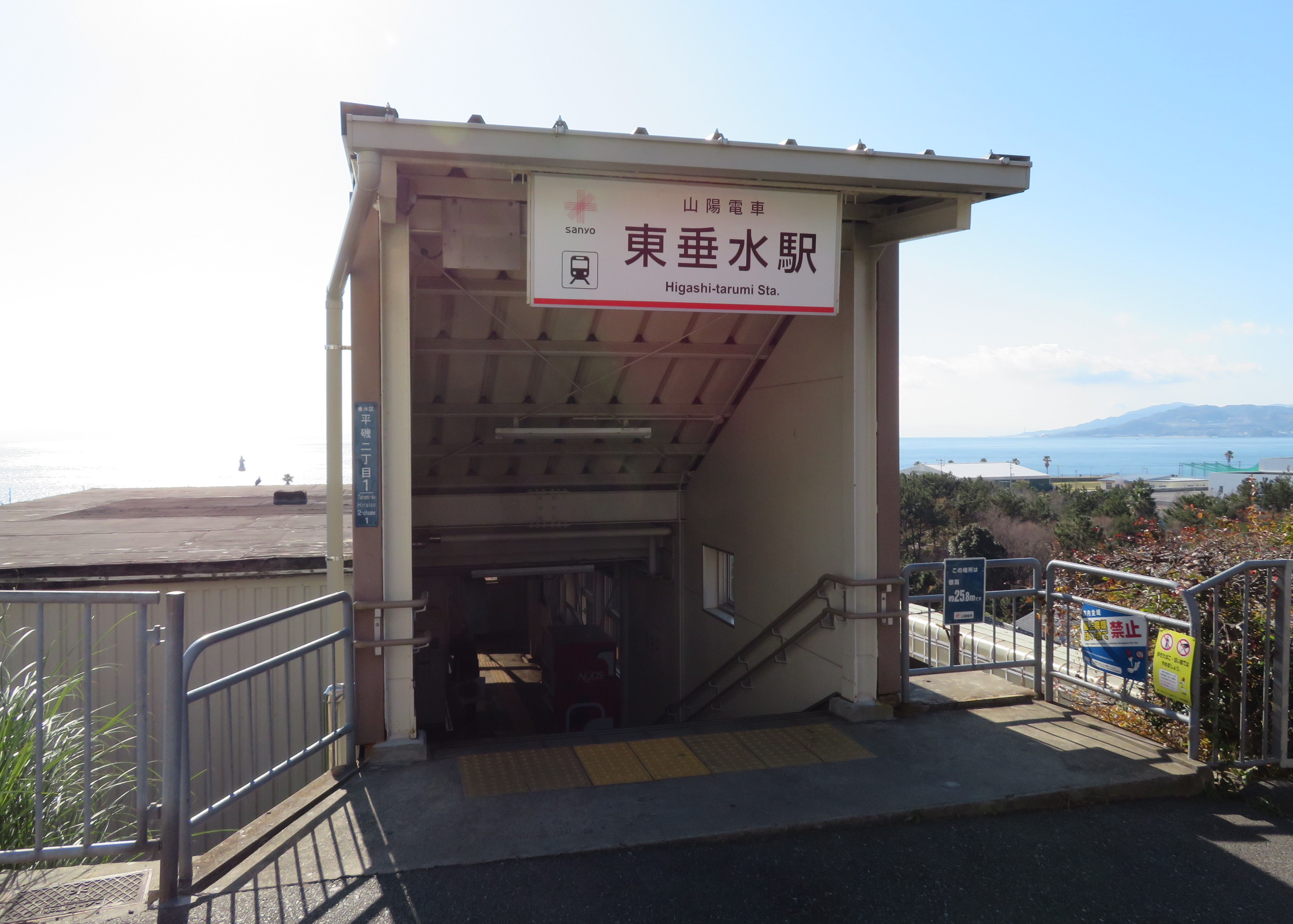 山陽電鉄東垂水駅 Canon PowerShot SX730 HS